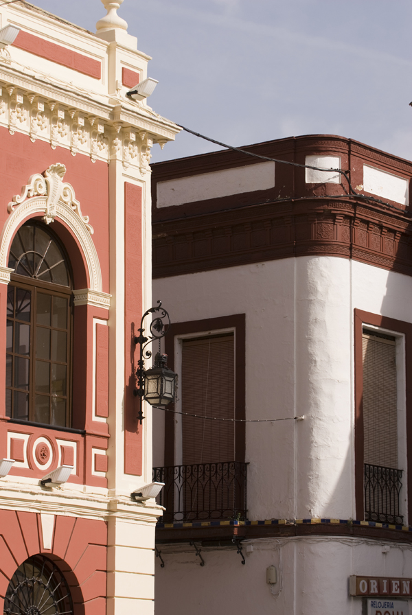 Inicio de la calle Corredera en la Plaza del Ayuntamiento de Morón de la Frontera